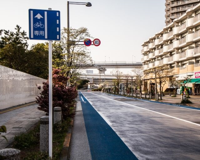 青いチャリンコ専用レーン（普通自転車専用通行帯） 自転車専用の道路標識がある 第一通行帯は自転車専用である 幅は1m以上とすること